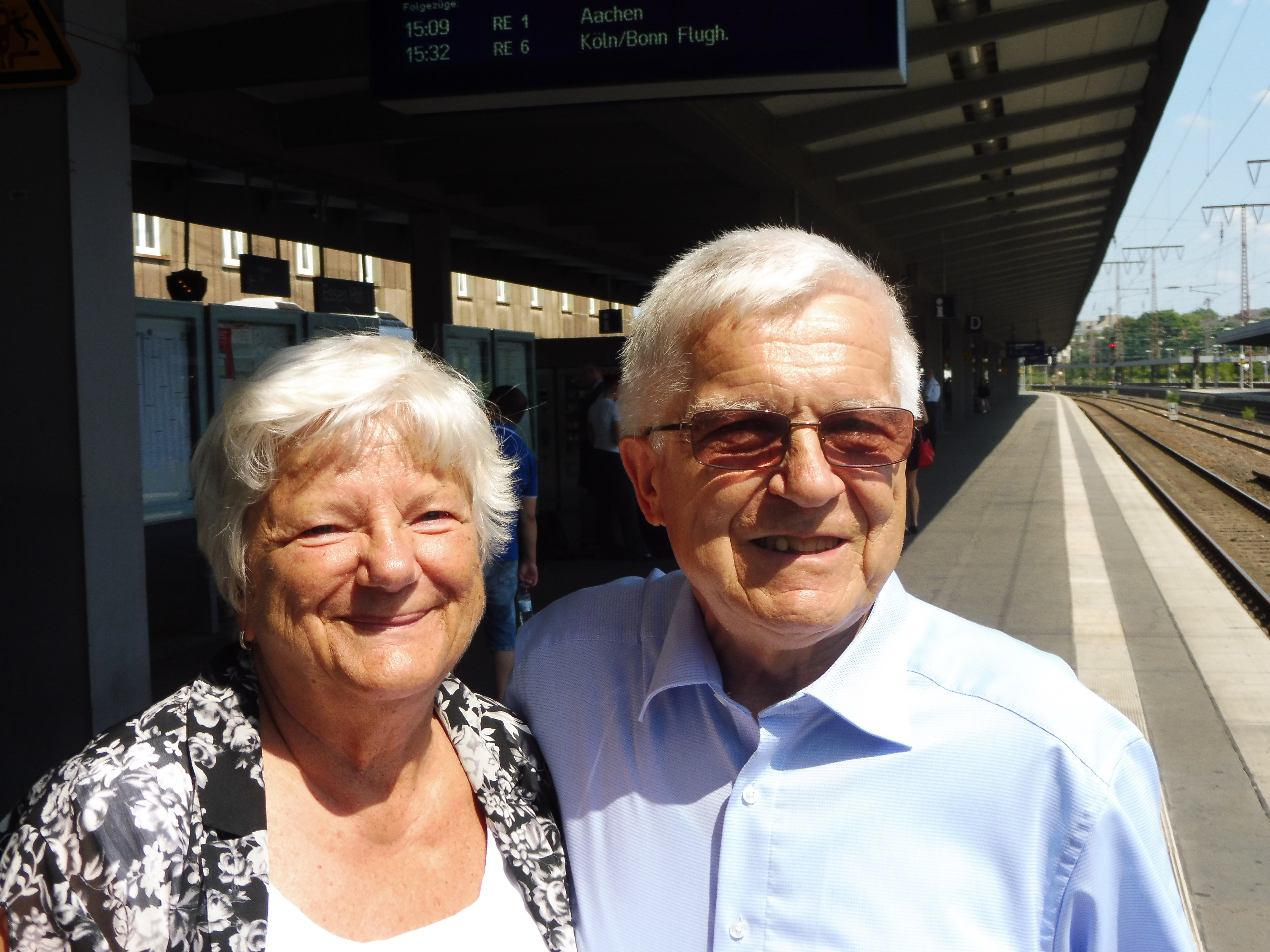 Elisabeth Maria Wojewski und ihr Mann Thaddäus Zajaczkowski im Hauptbahnhof Essen